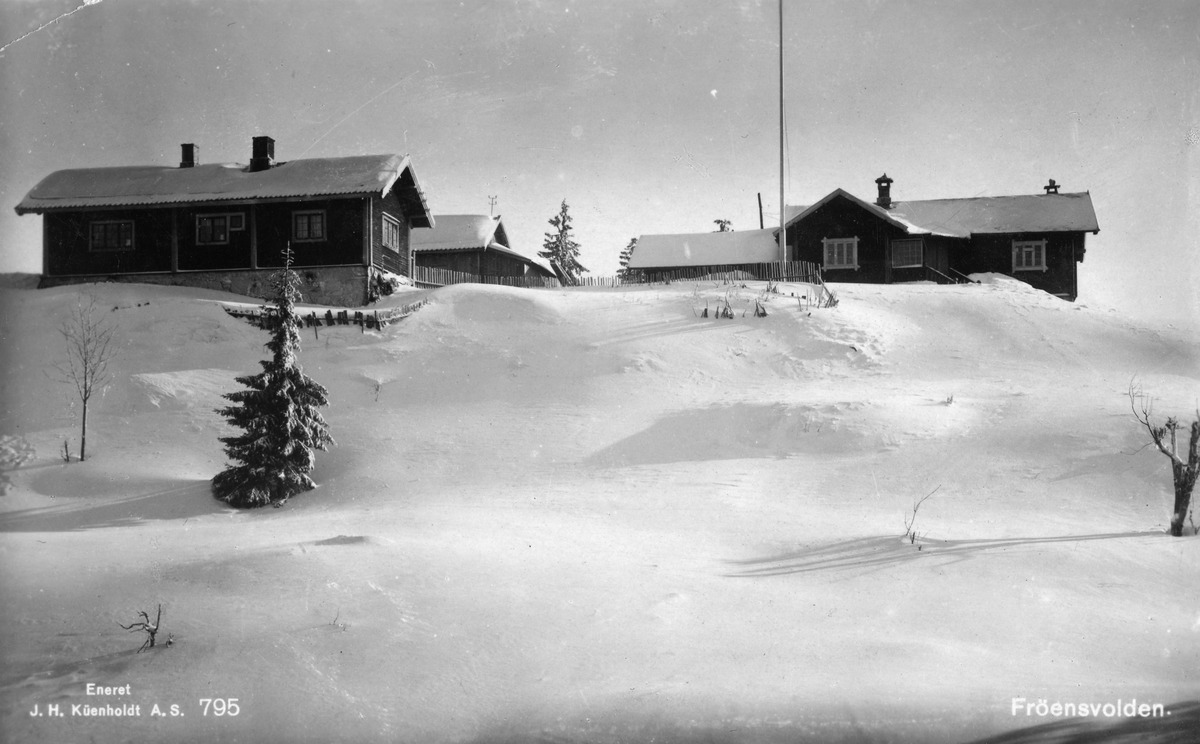 Frønsvollen ca. 1940